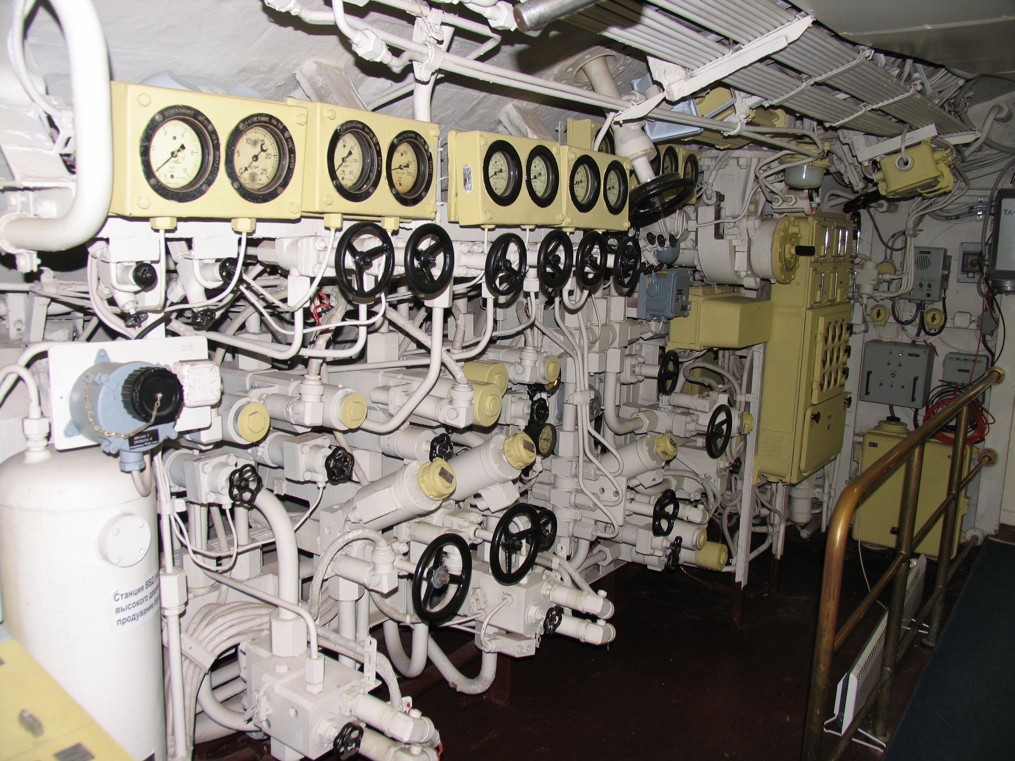 Подводная лодка Б-396. Третий отсек. Пост управления балластными цистернами.